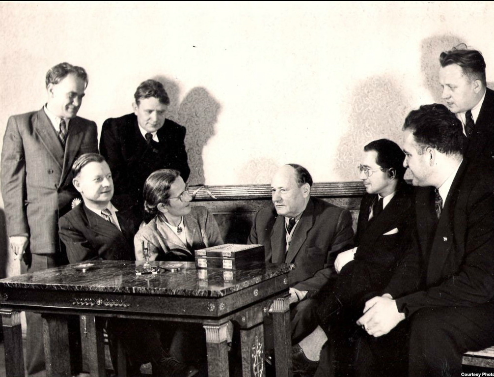 Якуб Колас з пісьменнікамі Максімам Лужаніным, Максімам Танкам, Янкам Брылём, Іванам Шамякіным і членамі польскай дэлегацыі